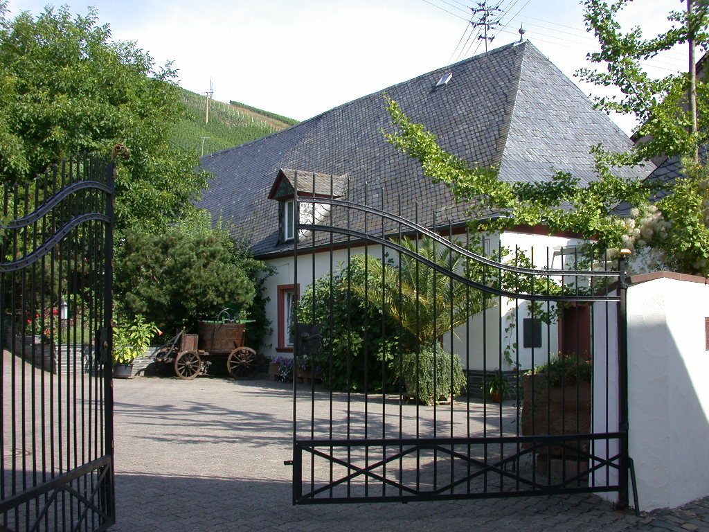 Weingut Paulinshof in Kesten an der Mosel